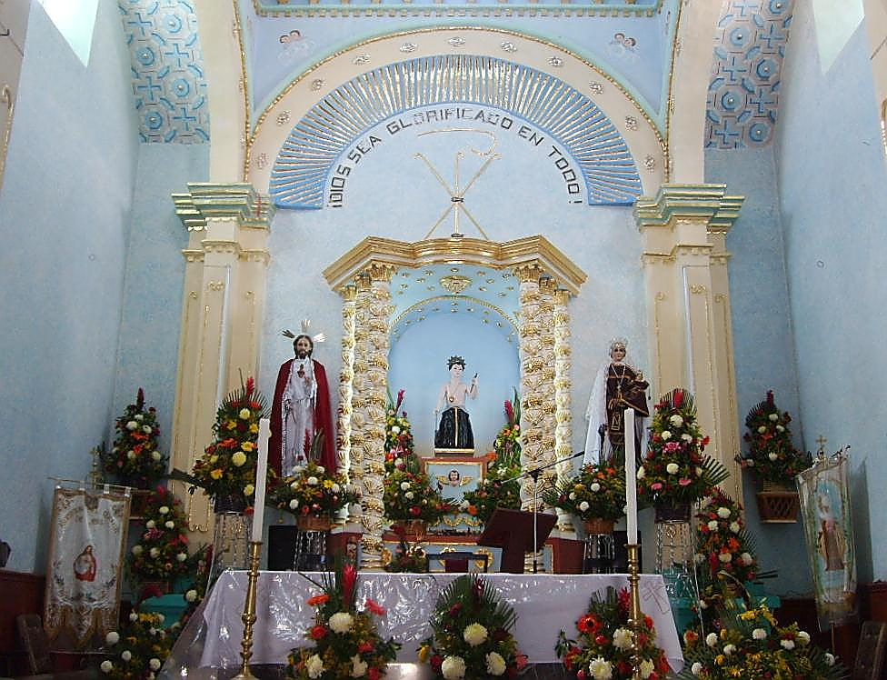 Altar de la parroquia de San Nicolás de Tolentino, con la imagen del santo patrono al centro. Terrenate, Tlaxcala.